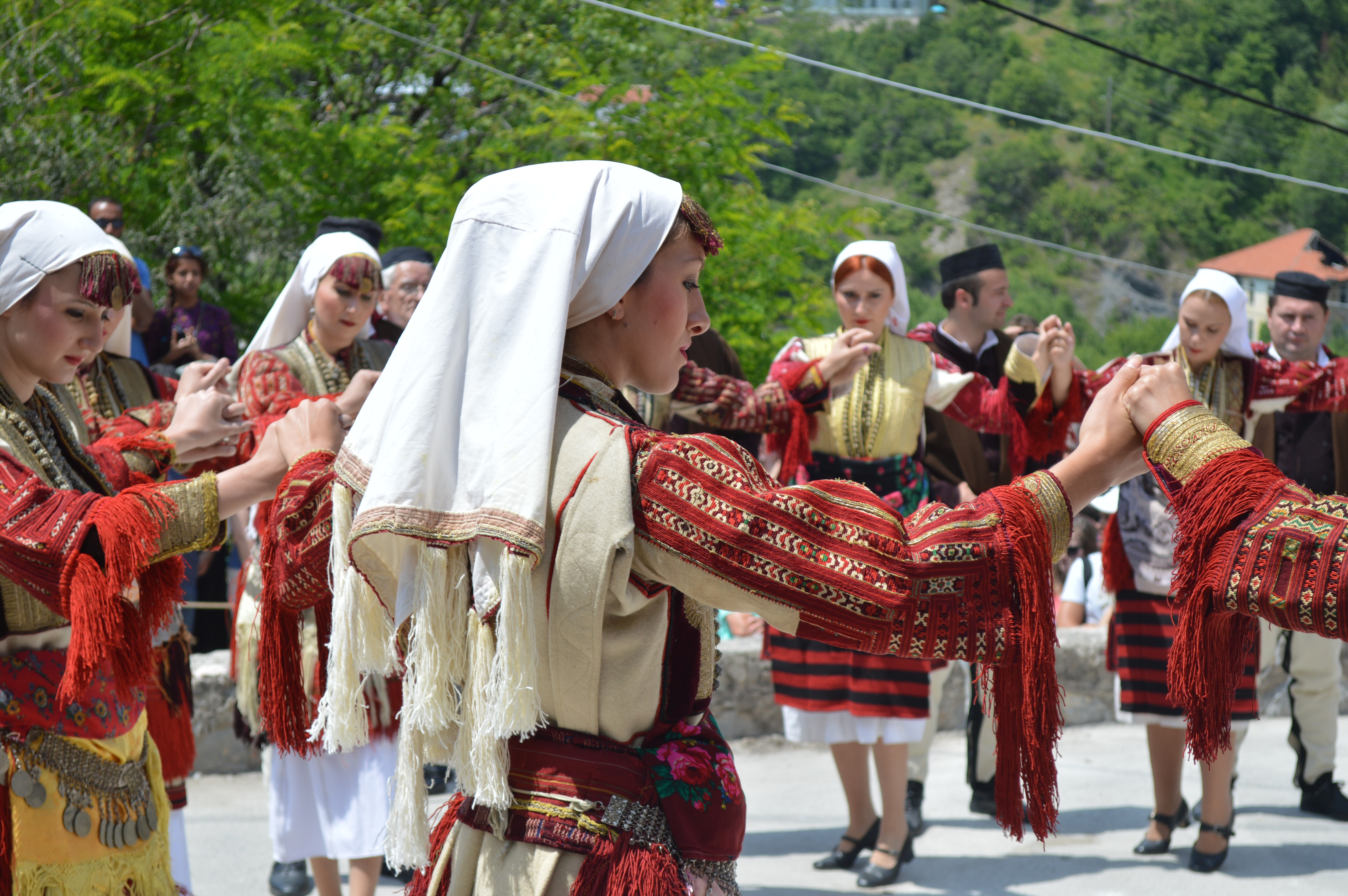 Фотографија од Галичката свадба,традиција прикажана преку македонските ора